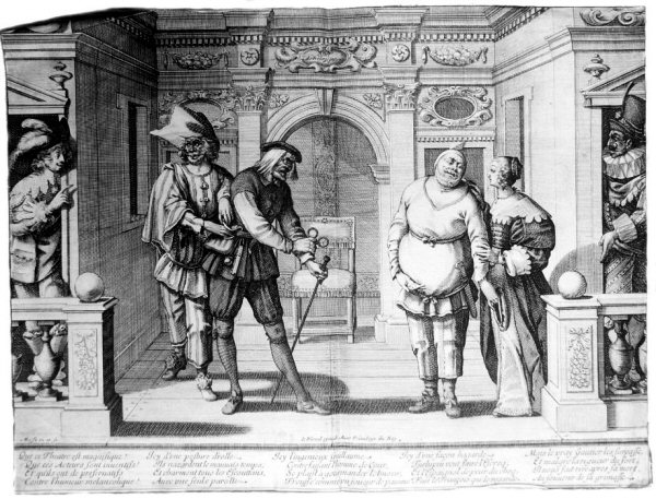 Gravure d'Abraham Bosse (1634), Ashmolean Museum, Oxford